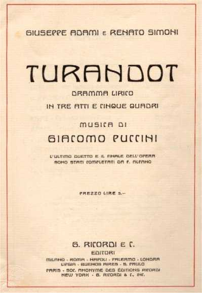 Frontespizio del libretto d'opera "Turandot" di G. Adami e R. Simoni musica di Giacomo Puccini - edizioni G. Ricordi & C. Milano - Prima rappresentazione alla Scala di Milano 25 aprile 1926